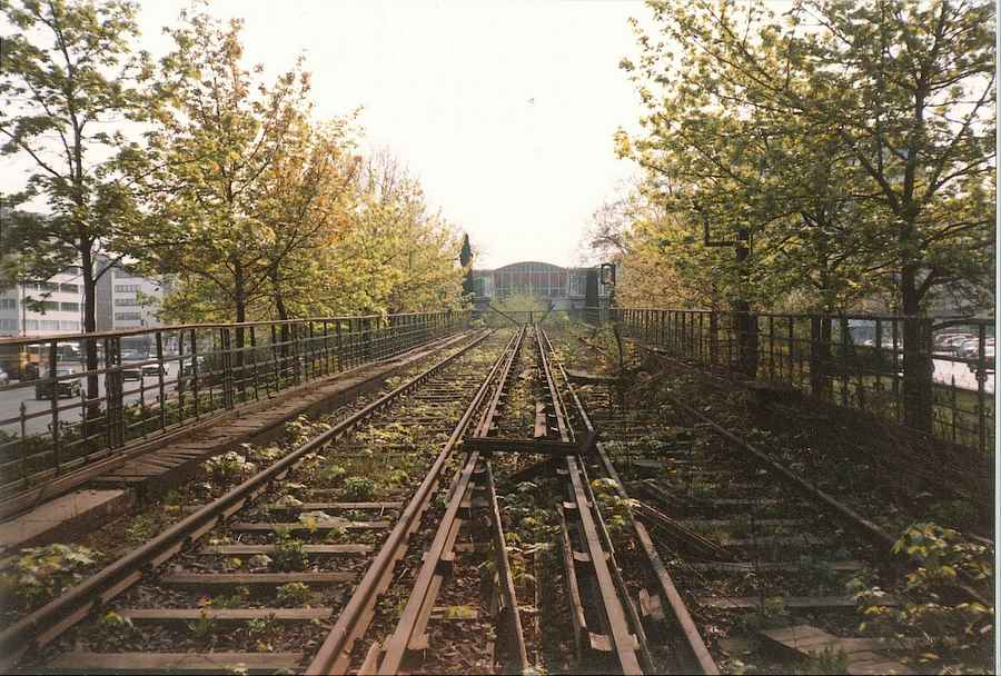 Stillgelegte Strecke der U2 in Berlin